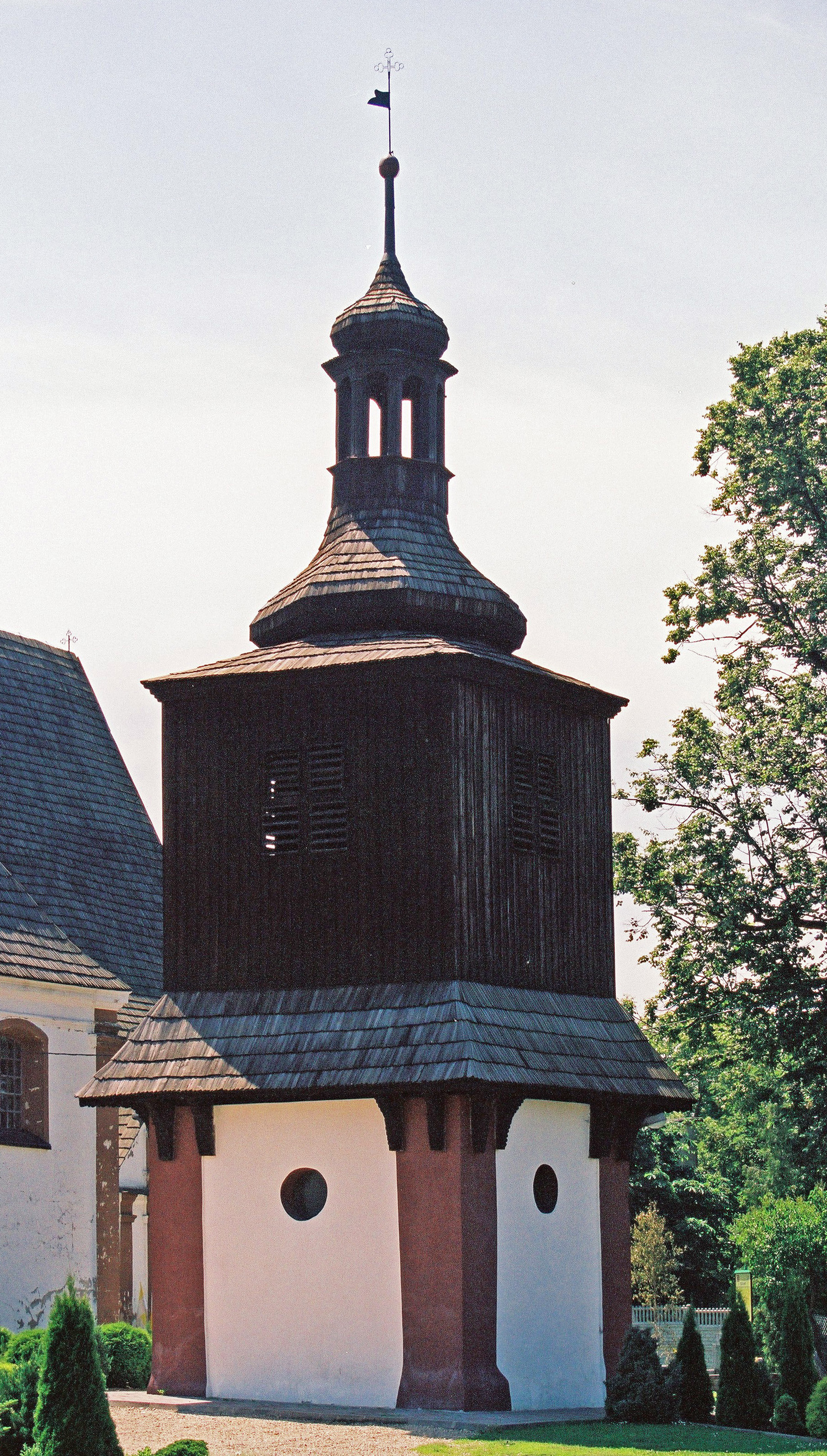 Dzwonnica kościoła w Sadowiu, gmina Koszecin, powiat lubliniecki, województwo śląskie